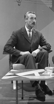 Dolf van der Linden in aflevering L, M van het AVRO-programma Van A tot Z